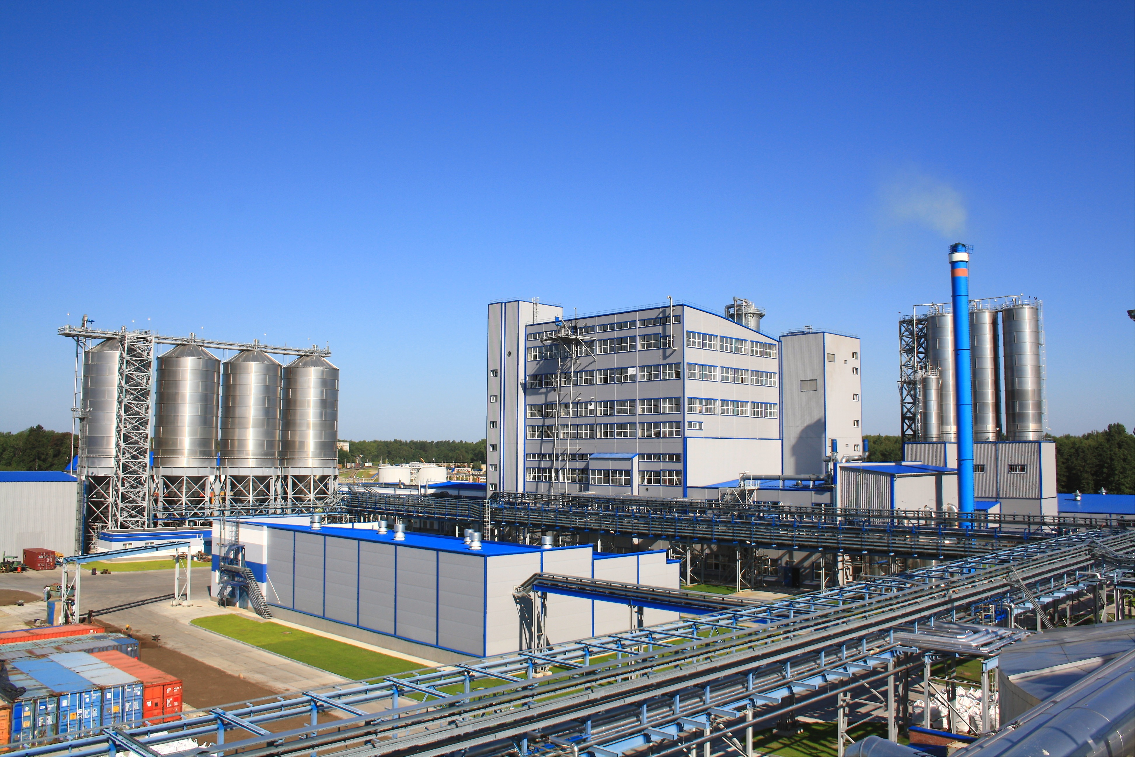 Первый резидент Балтийского Промышленного Парка